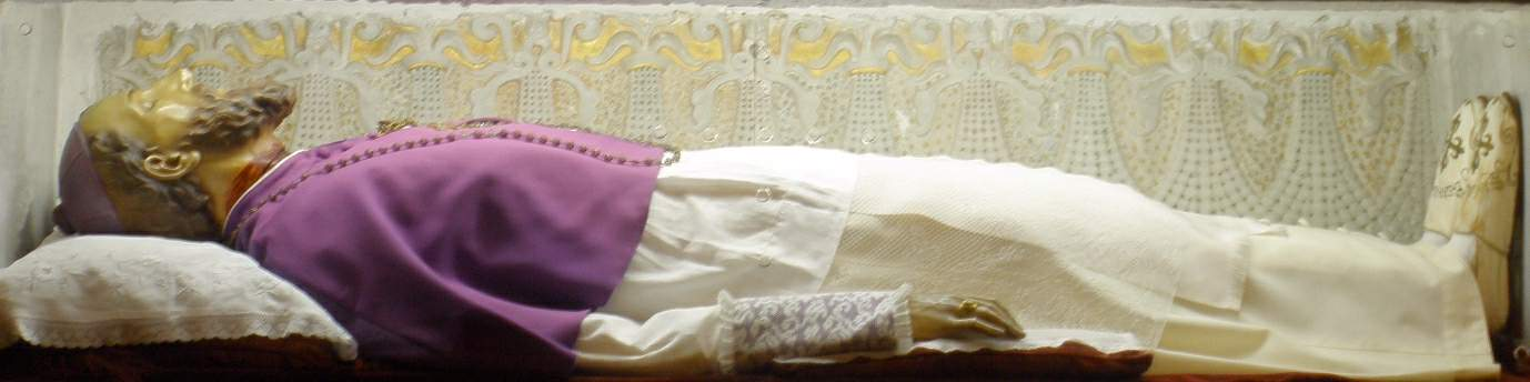 Basílica de la Purísima Concepción, Altar-Mausoleo de Valentín Berriotxoa (Elorrio, Vizcaya)